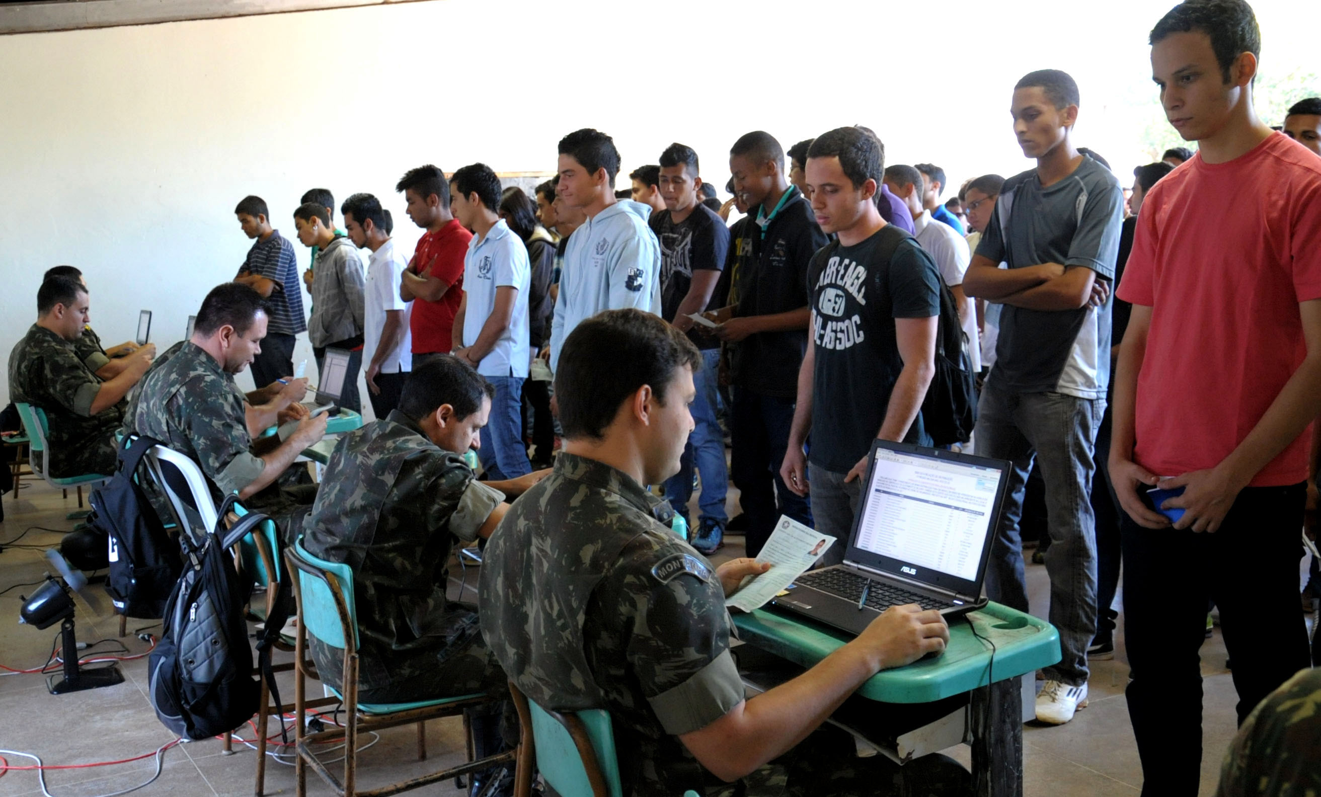 10/01/2014, Brasília - DF Fotos: Jorge Cardoso